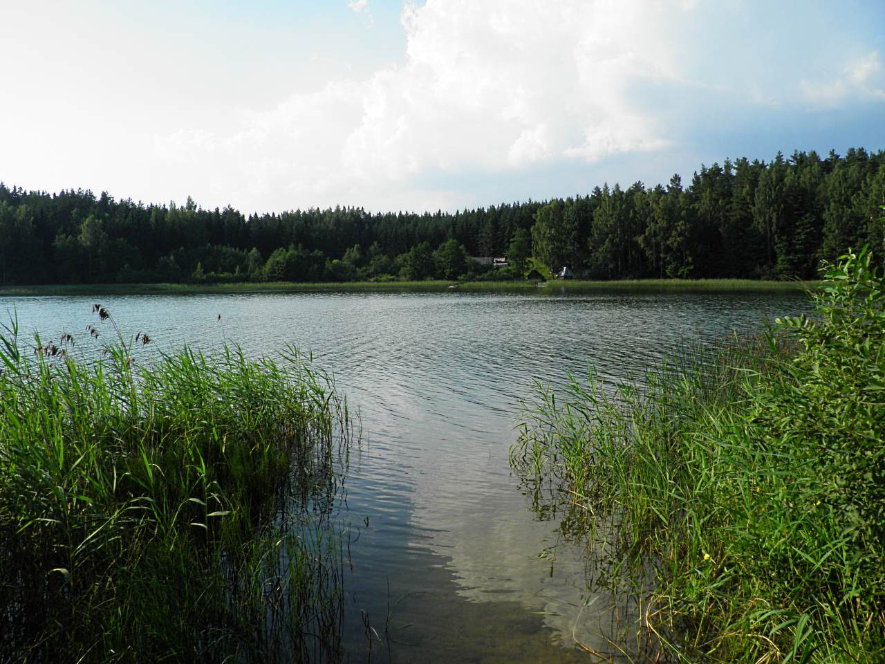 Оз. Дубулю-2